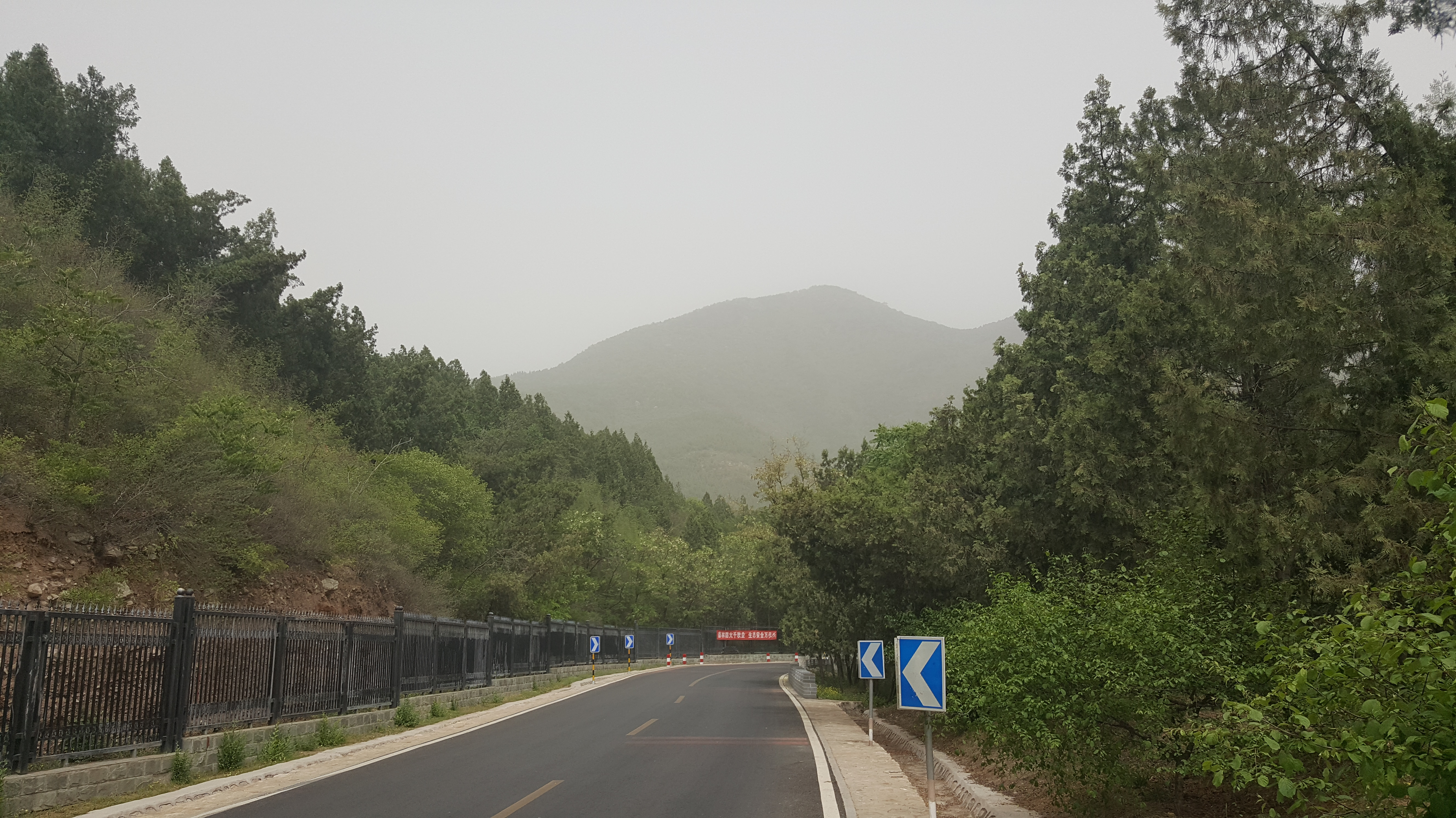 远眺蟒山森林公园